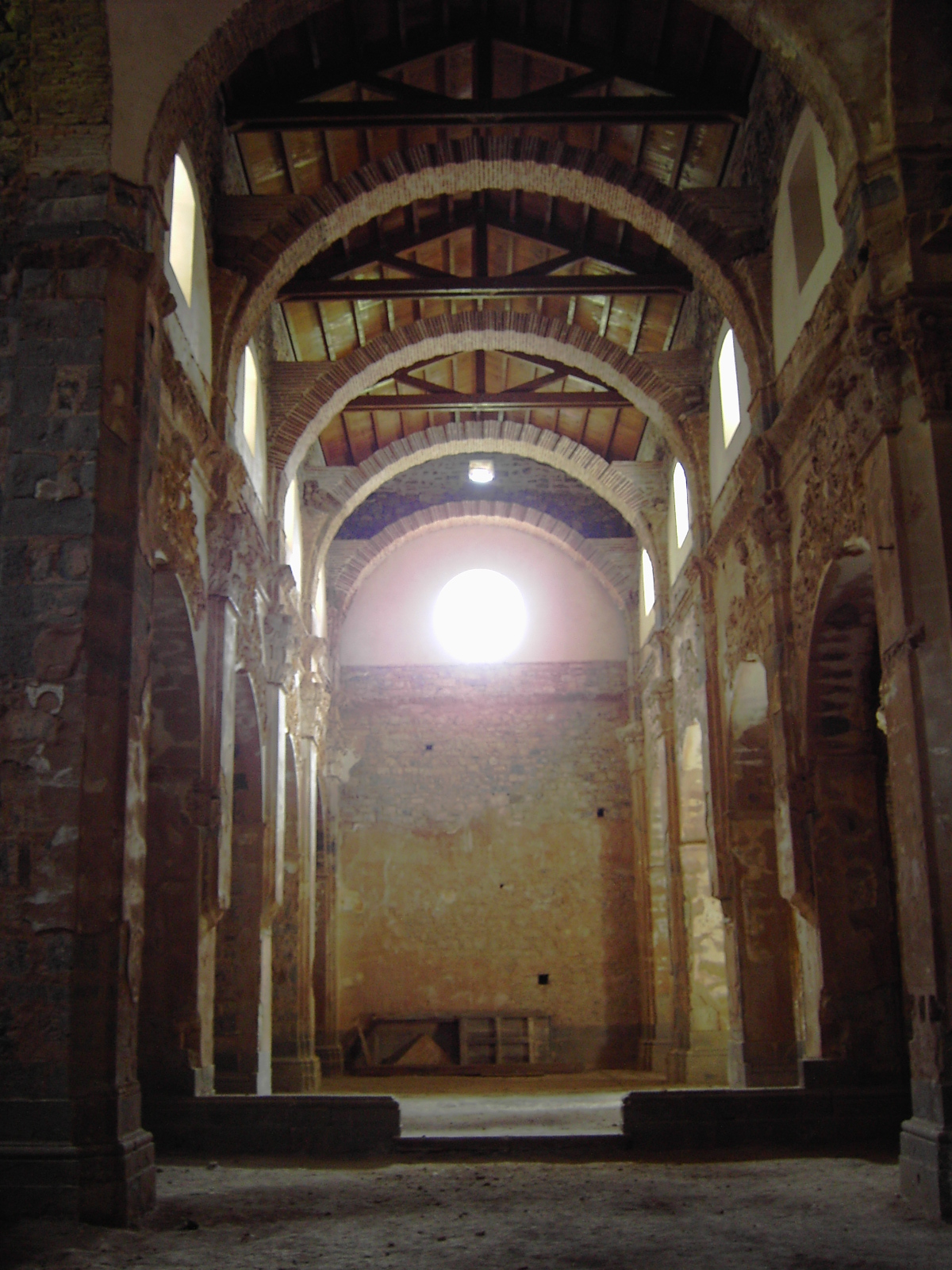 La nave principal de la iglesia de San Victorián, tras la instalación de las nuevas cubiertas. Otoño de 2006.